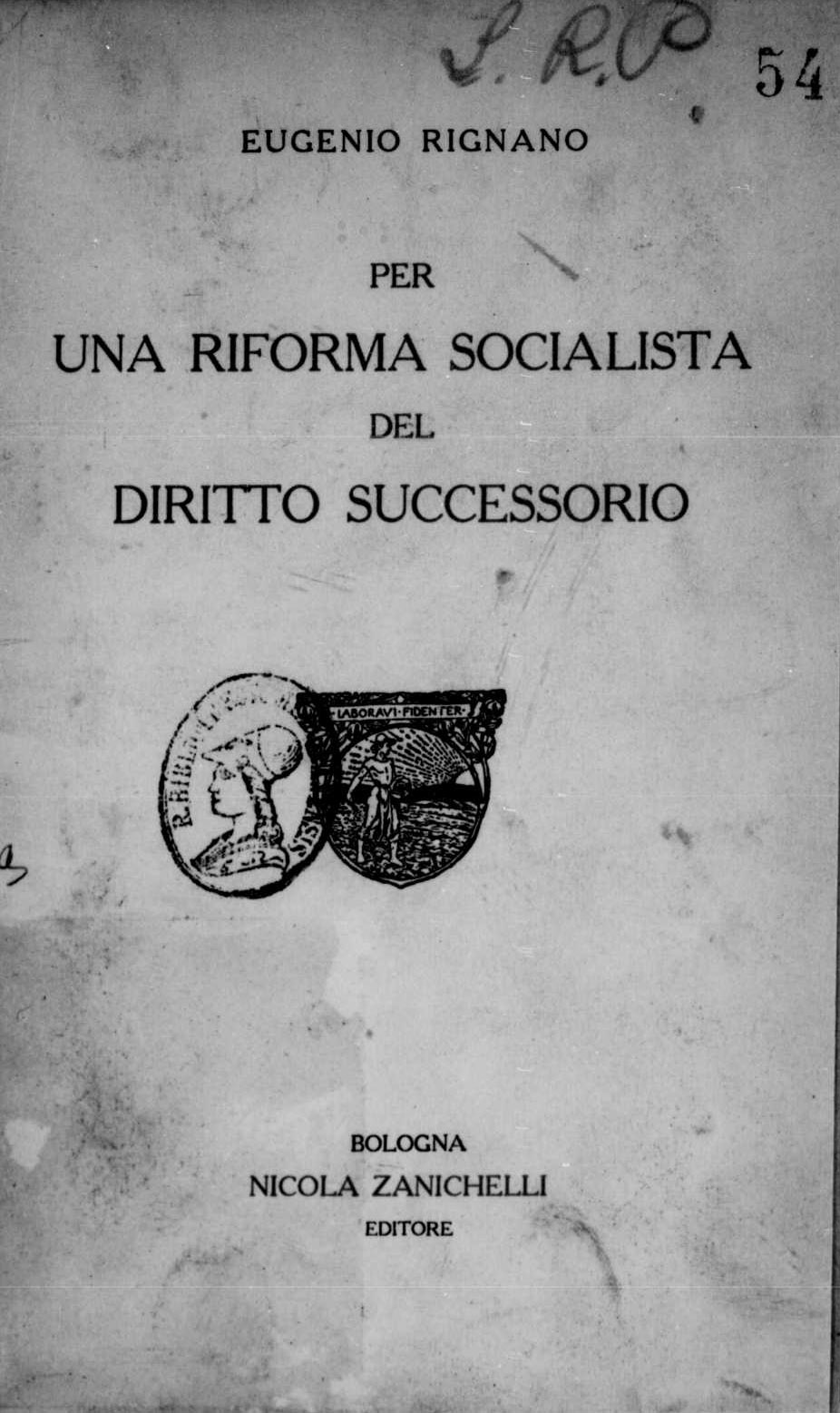 Frontespizio